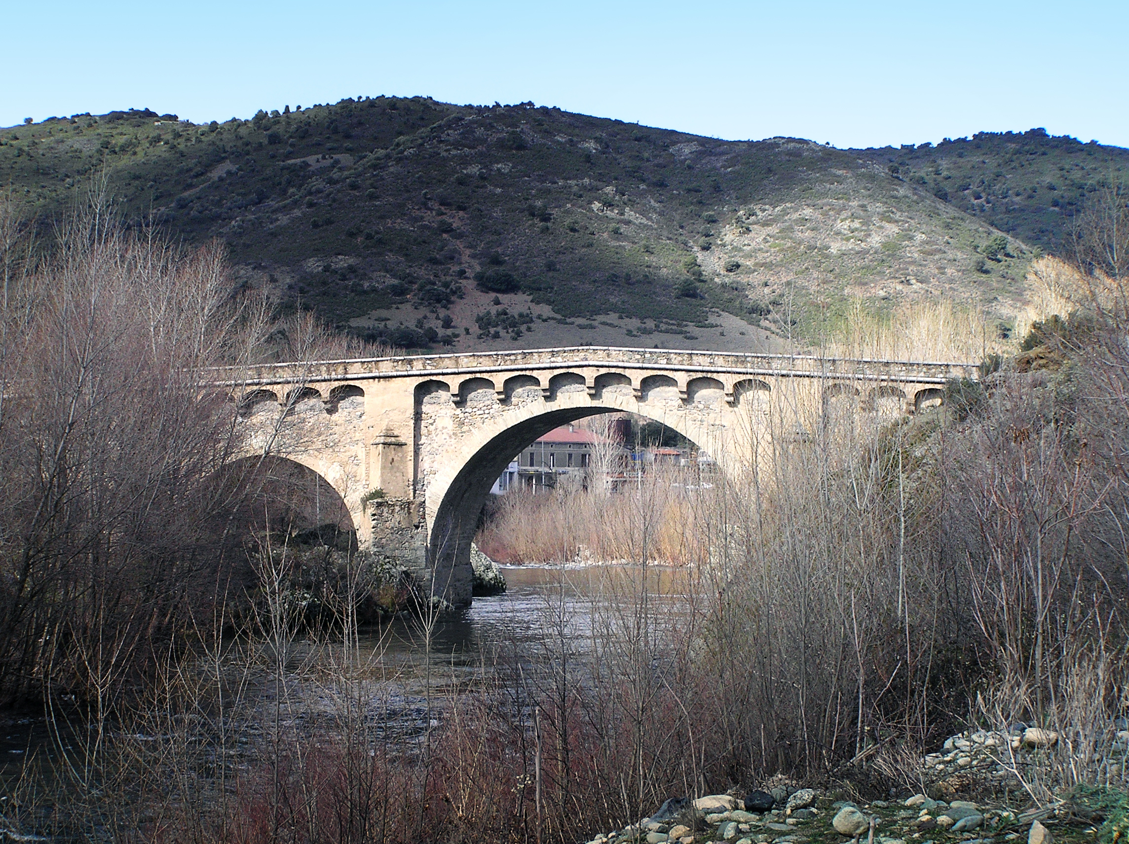 Morosaglia, Rustinu (Corse) - Pont génois de la RN 1893 sur le Golo